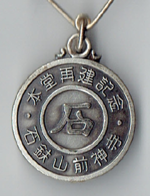 前神寺 本堂再建記念バッジ